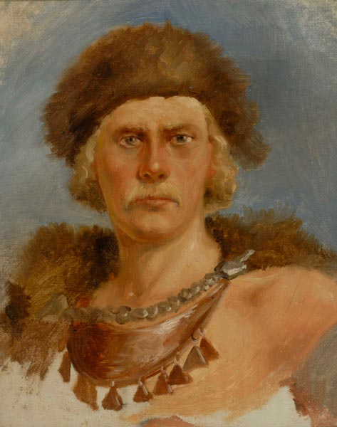 молодой ливский войн